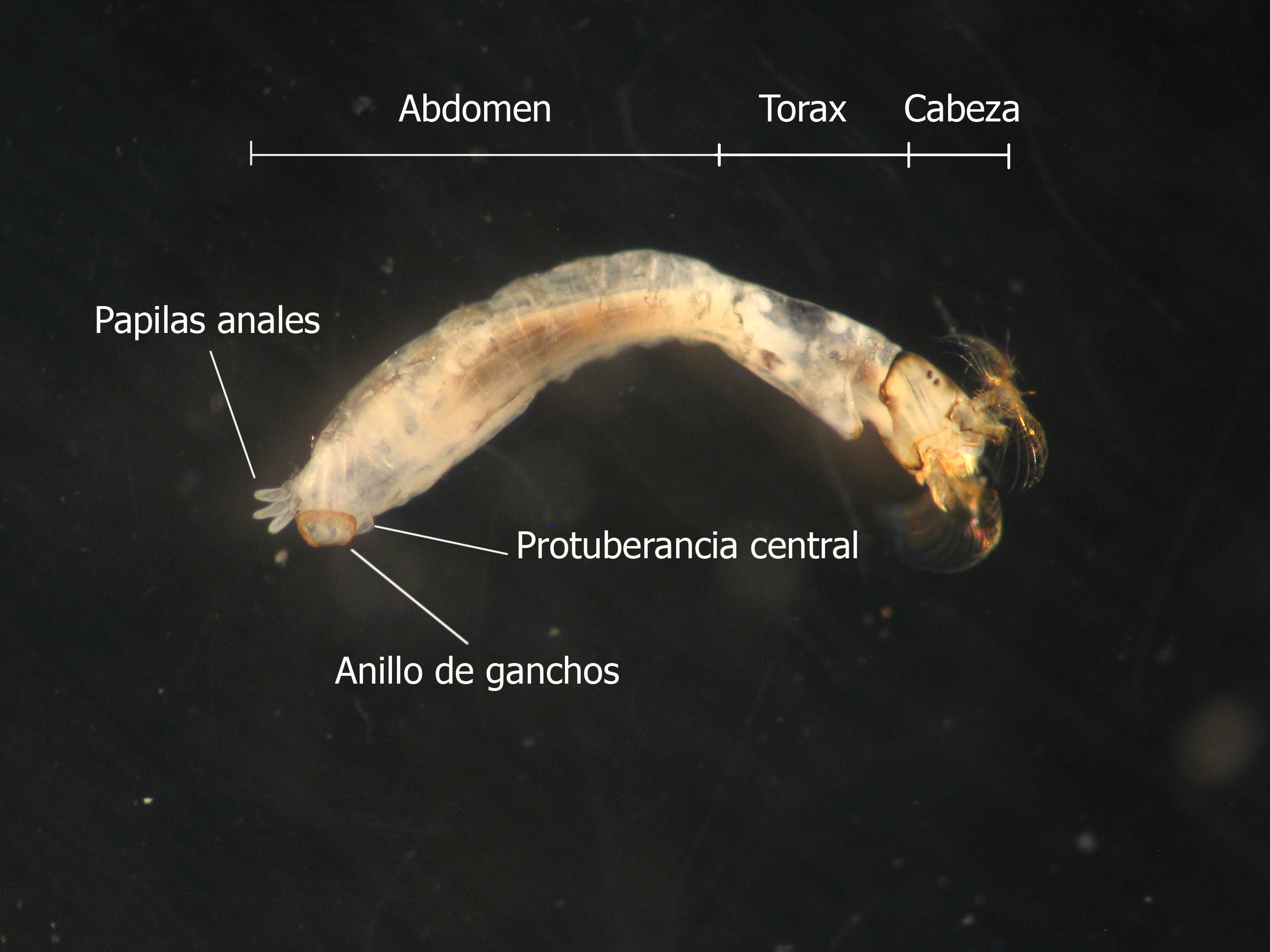 Anatomia Abdomen Simuliidae